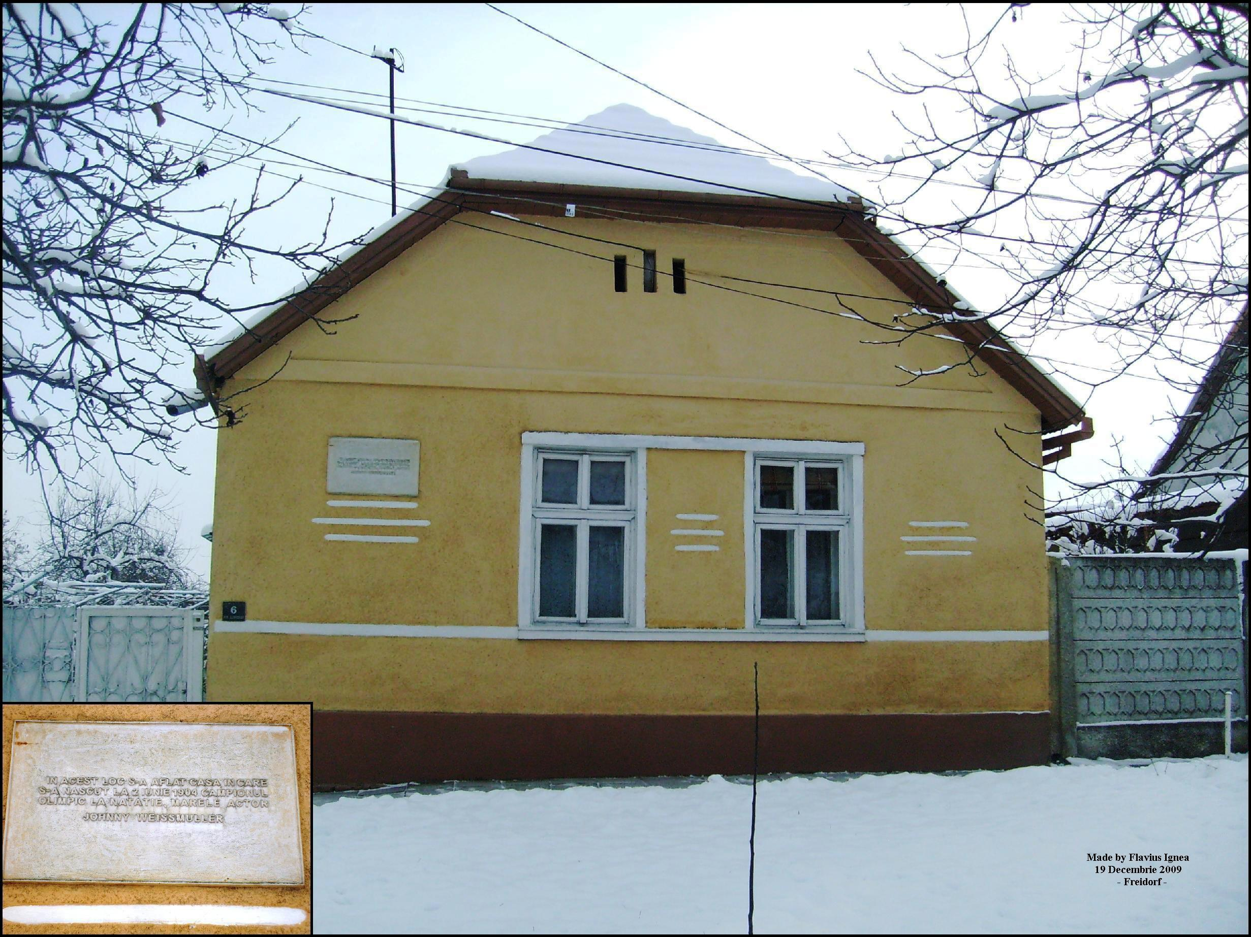 Casa care se află pe locul unde (probabil) s-a aflat în anul 1904 locuința unde s-a născut Johnny Weissmüller, Freidorf, Banat